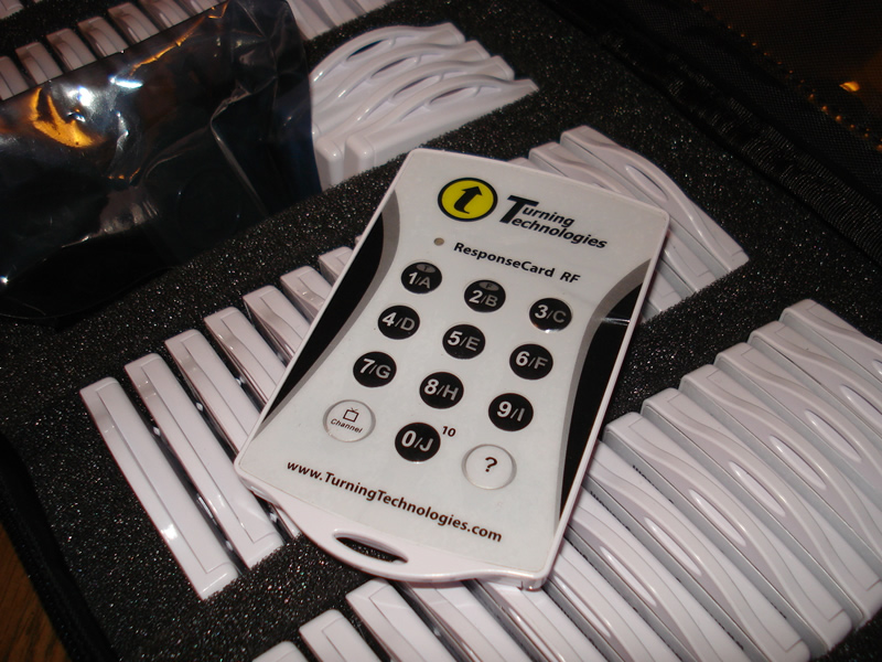 Boitier de vote interactif Response Card RF02 de chez TURNING TECHNOLOGIES